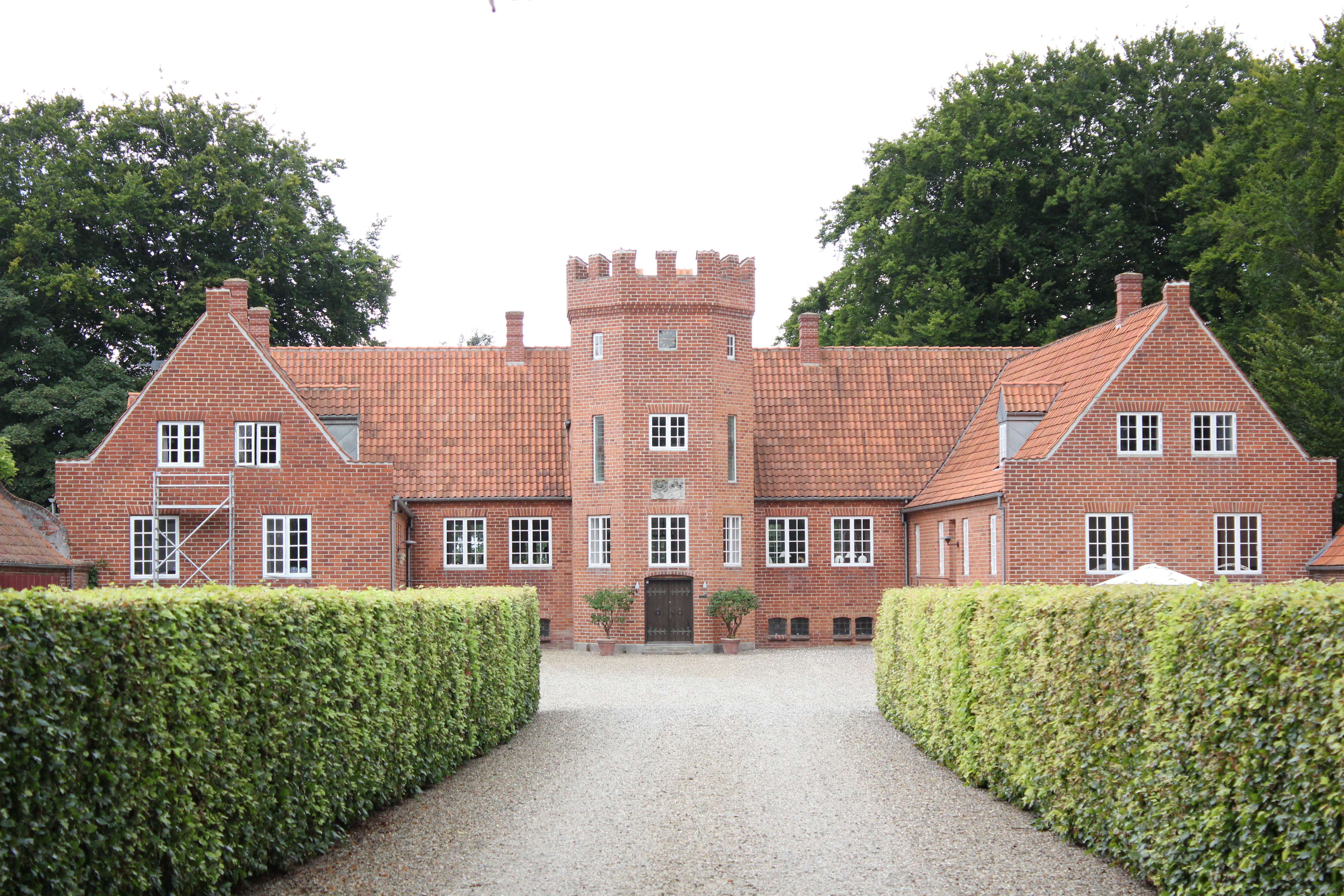 Kollerup Gods uden for Hadsten